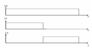 Bildung einer Laplacepyramidenebene(Spektrum)